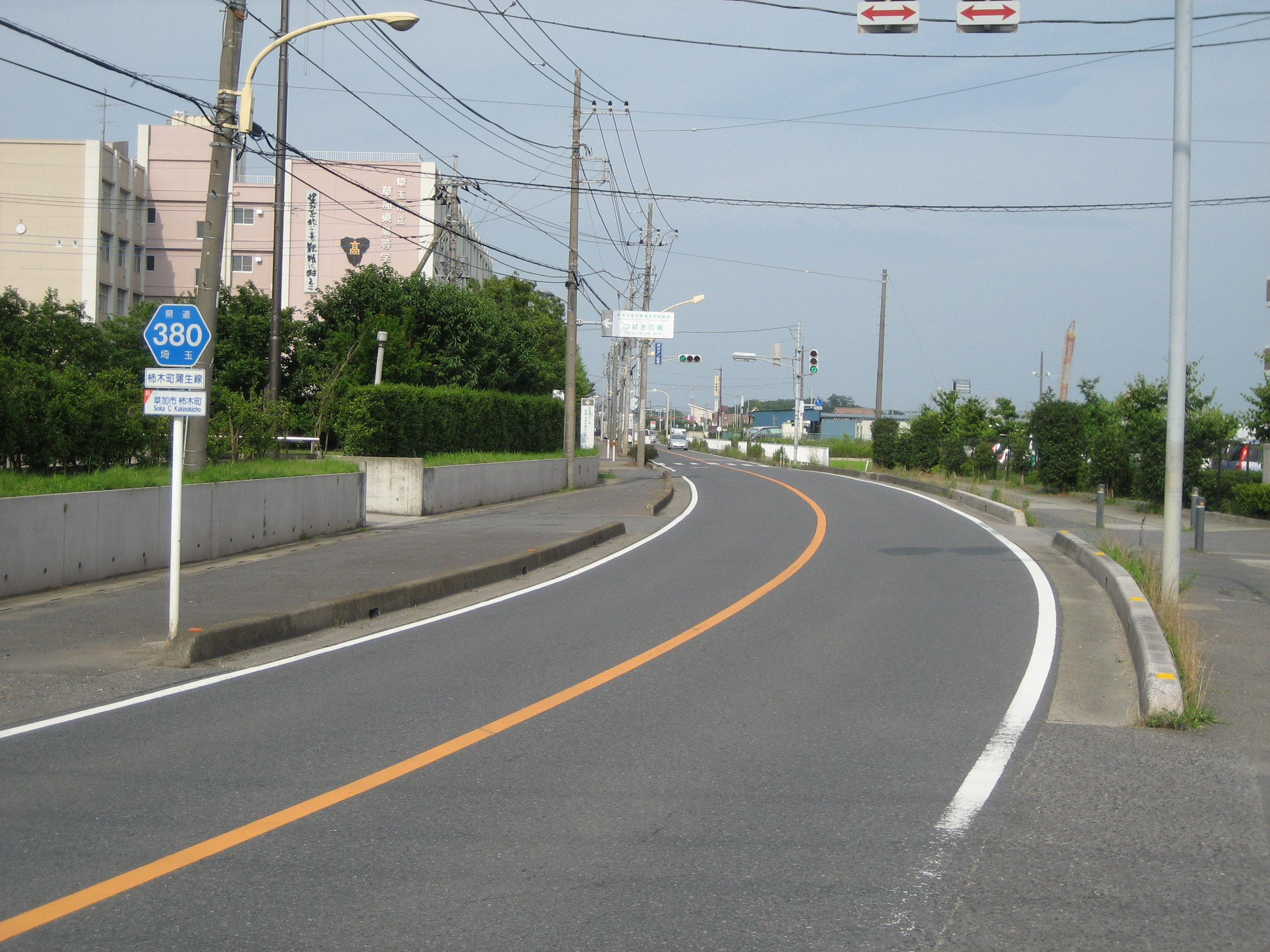 埼玉県道380号線草加東高等学校付近